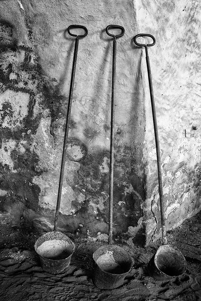 Giesser